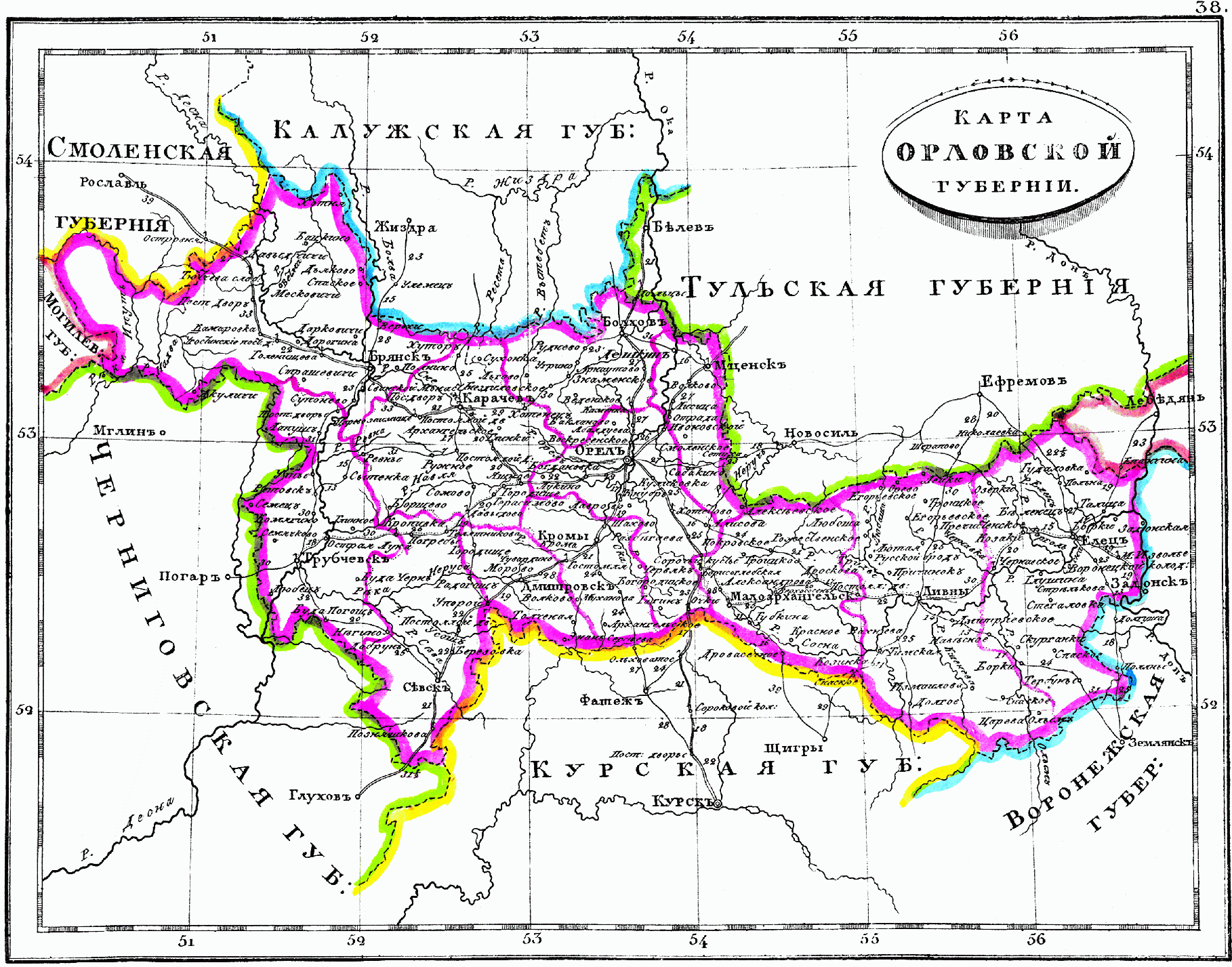 Карта Орловской губернии, 1835